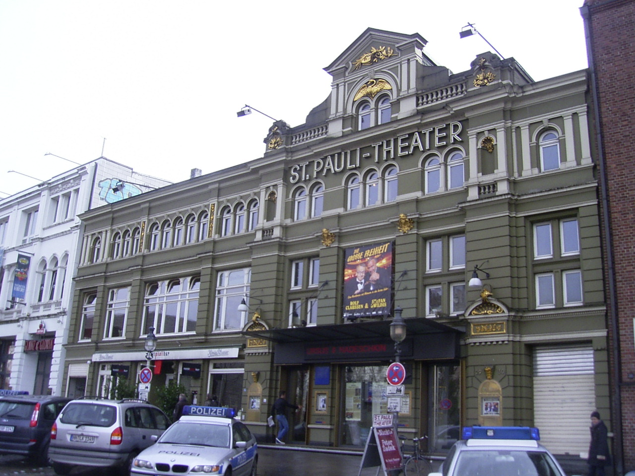 Das St.-Pauli-Theater liegt am Spielbudenplatz 29/30 in St. Pauli. Die Fassade von Franz Jacobsen stammt aus dem Jahre 1898, das Innere ist älter (1840/41). Es stand von 1895 bis 1918 unter der Leitung von Ernst Drucker, nachdem es bis 1941 benannt war. This is a photograph of an architectural monument.